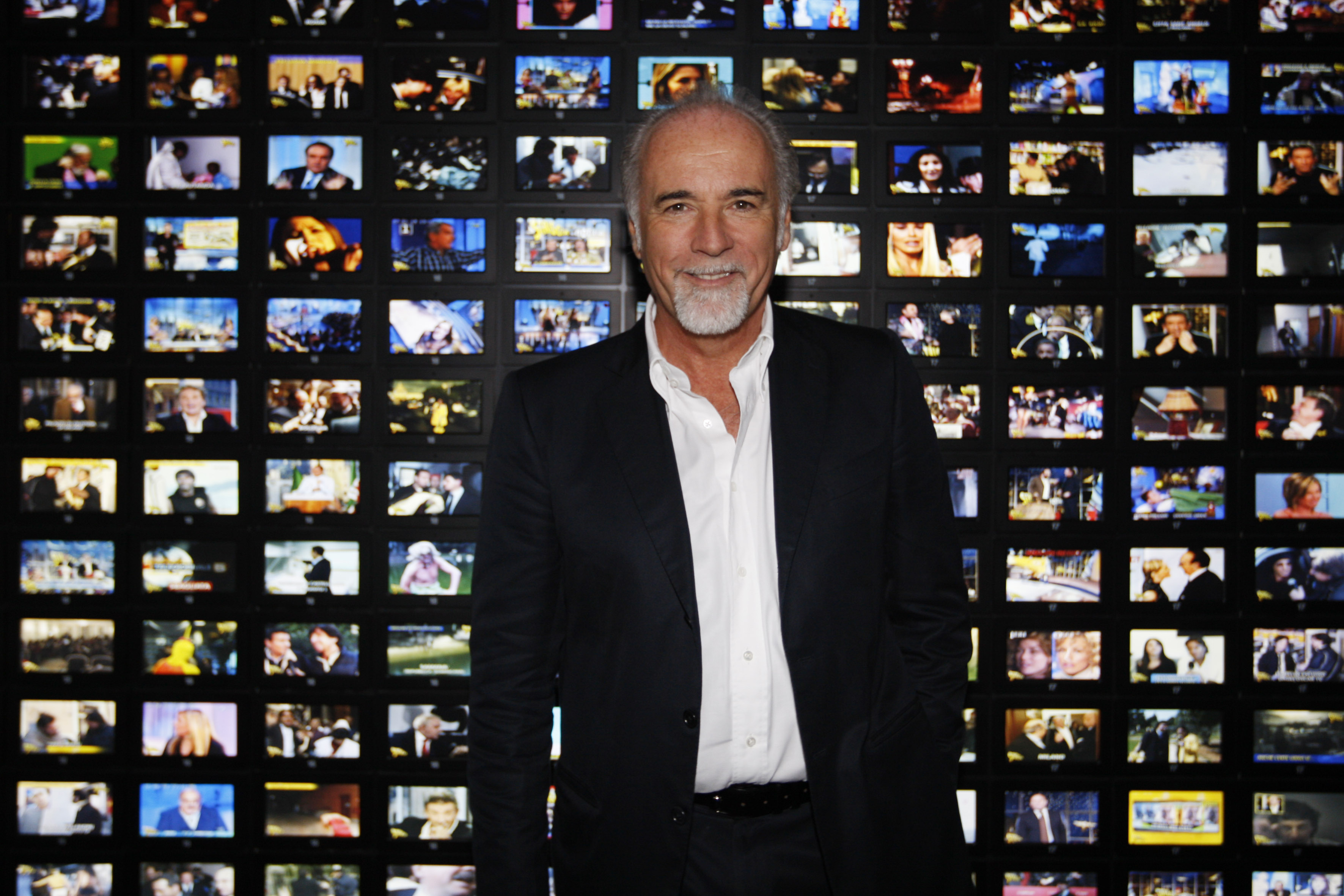 Antonio Ricci alla Triennale di Milano in occasione della mostra "Venti di Striscia"